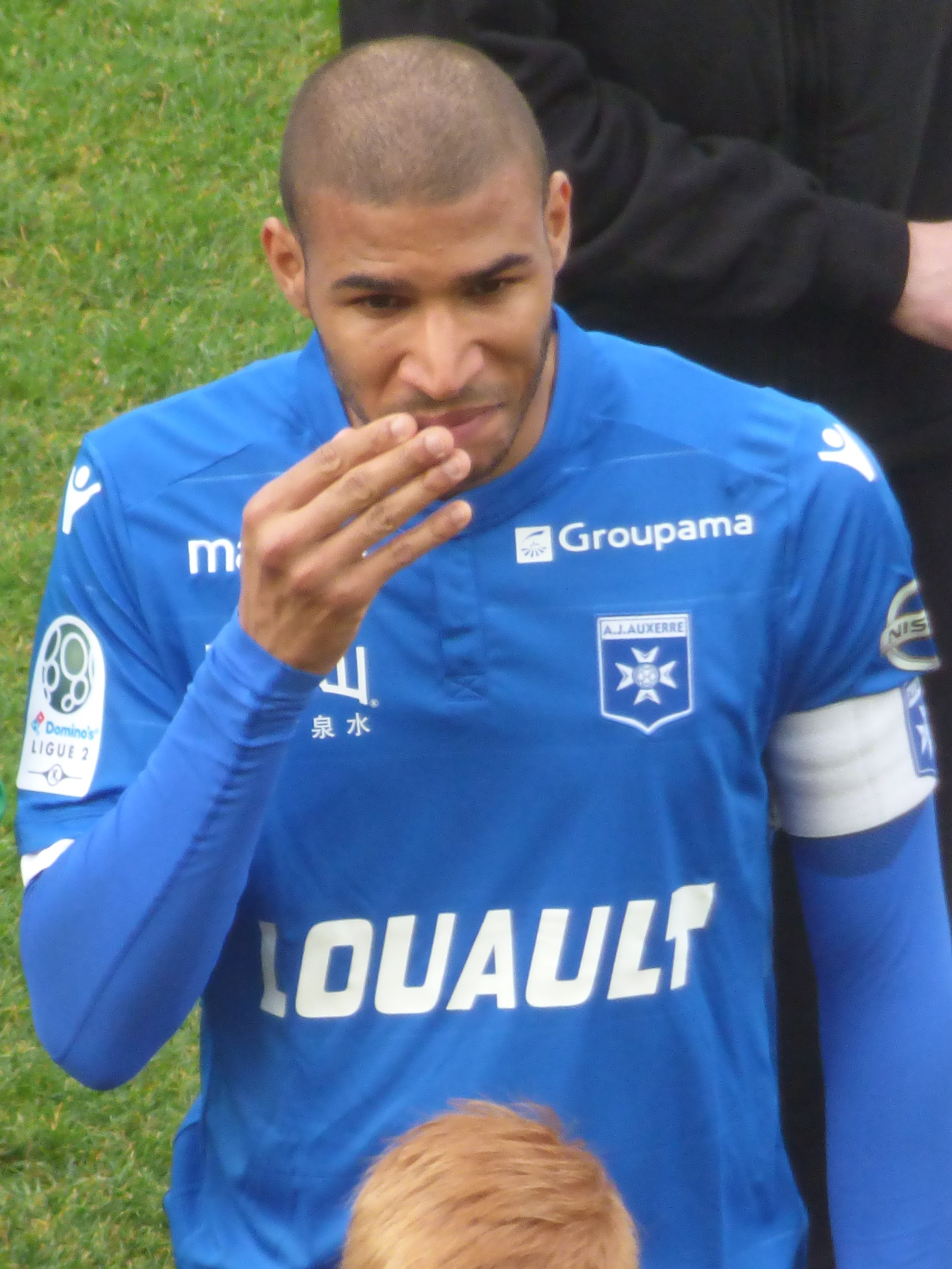 Jordan Adéoti avant le match RC Lens - AJ Auxerre, comptant pour la 28ème journée du championnat de France de football de Ligue 2 2018-2019, le 9 mars 2019 au Stade Bollaert-Delelis.